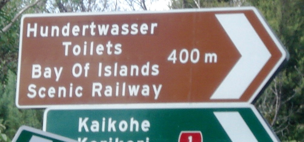 NZ - Kawakawa - Hundertwasser toilets - Sign